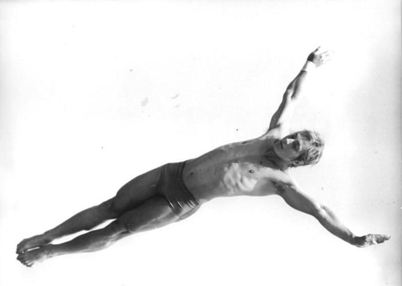 Falk Hoffmann ADN-ZB Kluge 23-6-73 Leipzig: DDR-Meisterschaften im Wasserspringen- Nach dem Vorkampf am 22.6.73 im Kunstspringen der Herren machte Titelverteidiger Falk Hoffmann (SC Chemie Halle) mit dem ersten Platz seine erneute Favoritenrolle deutlich. Unser Foto zeigt den Hallenser bei einem gestreckten Delphin-Kopfsprung, für den er 36,0 Punkte erhielt.